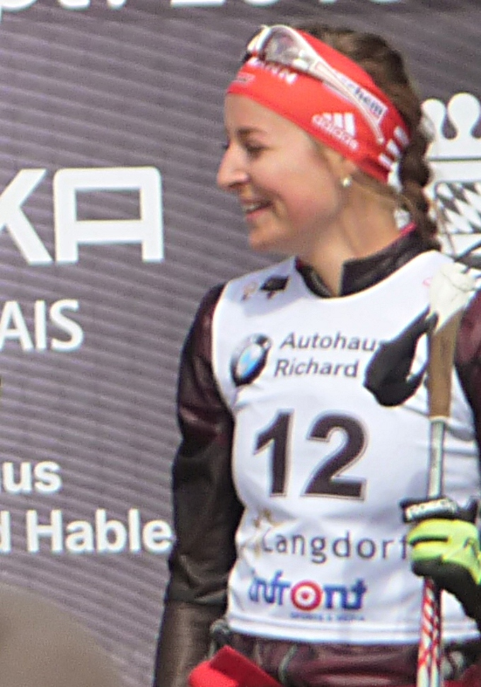 Luise Kummer bei der Deutschen Biathlon-Meisterschaft 2015